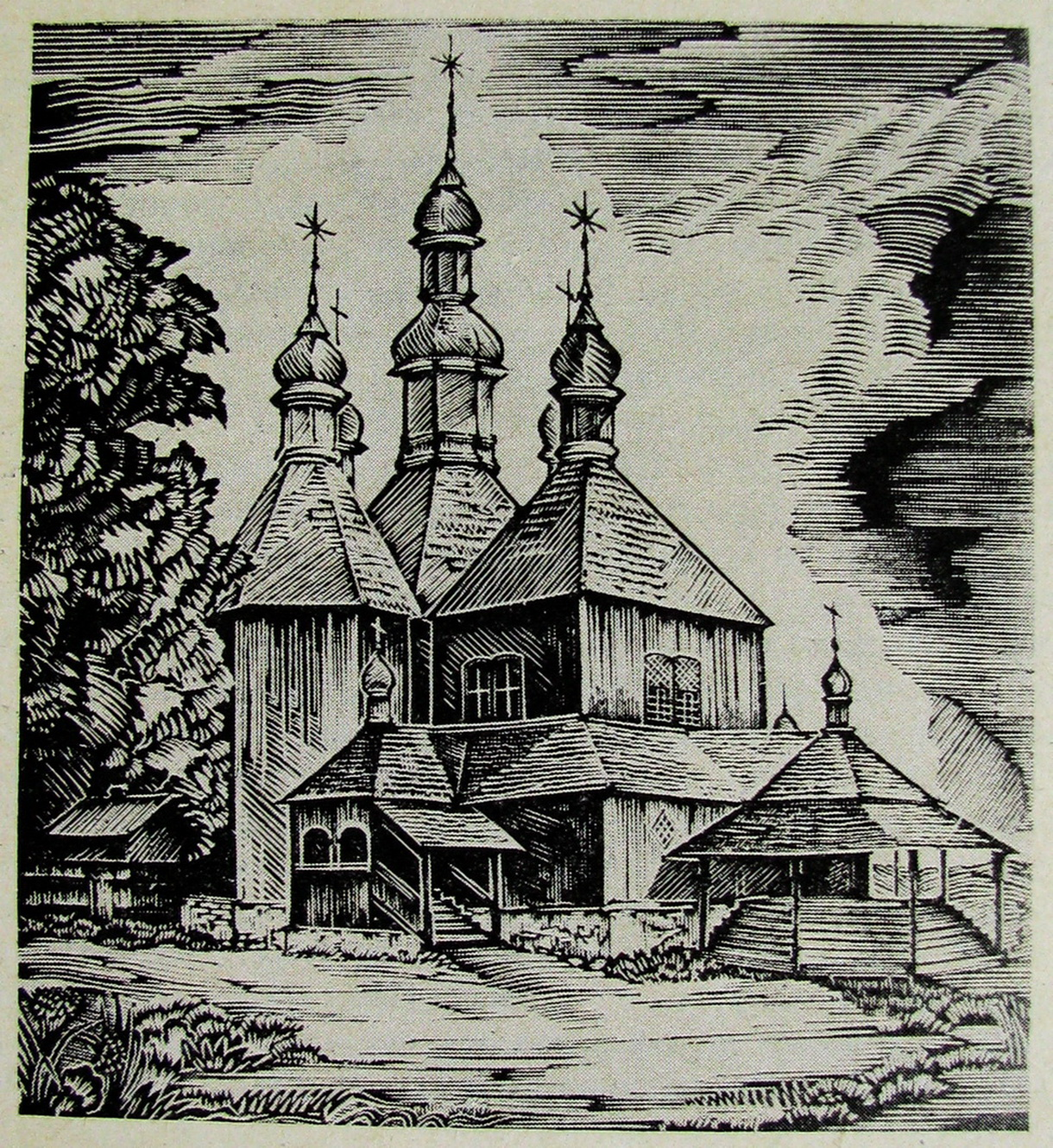 Беларуская (тарашкевіца): Карціна Яфіма Мініна "Ільінская царква ў Віцебску"